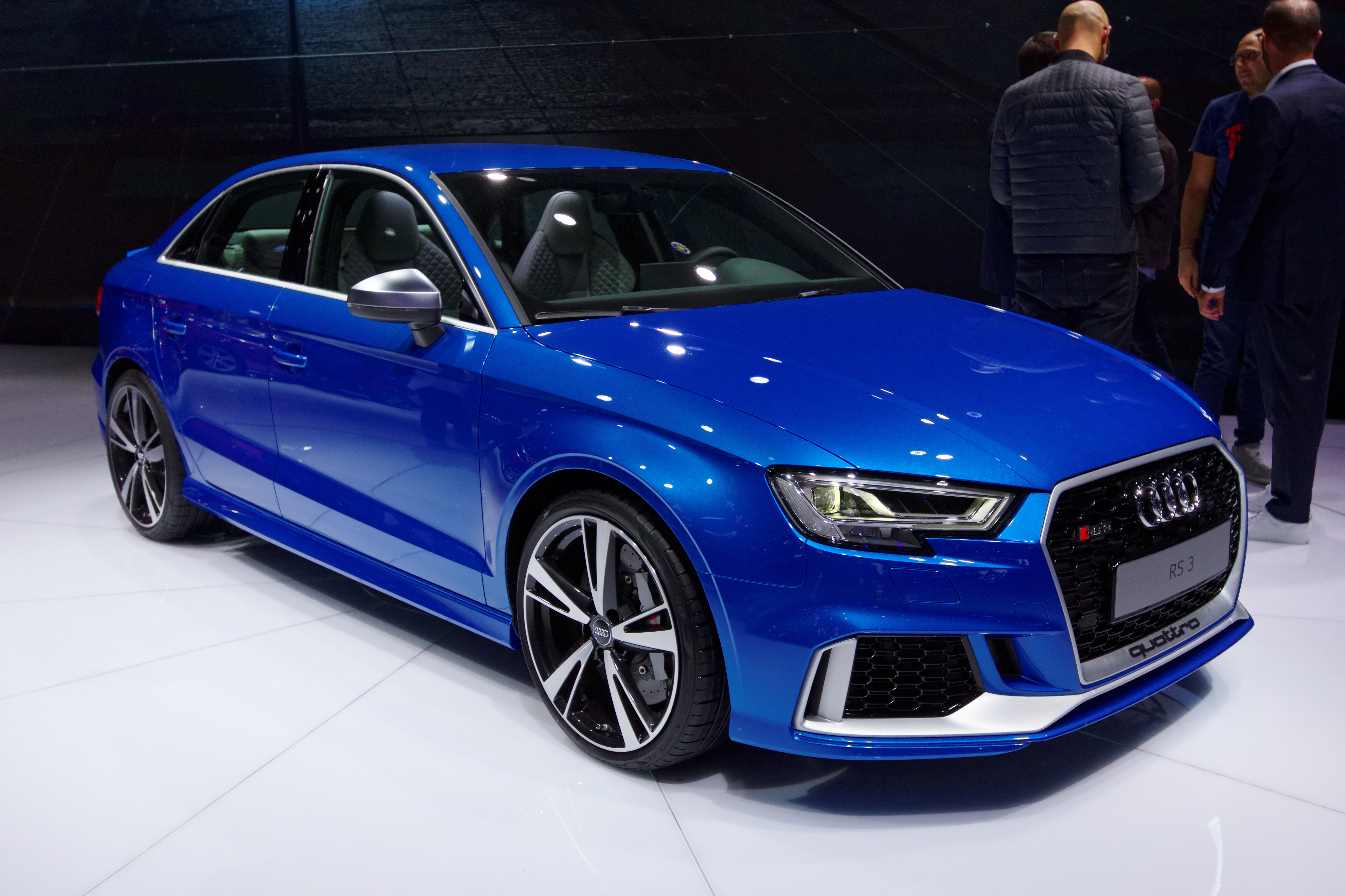 UneAudi RS 3 quattro présentée lors du mondial de l'automobile de Paris 2016.